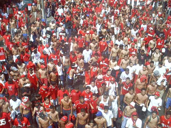 caravana de hinchas del America llendo para el Pascual Guerrero